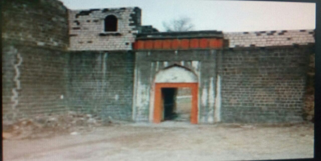 अत्यंत भव्य दिव्य असे १२ फूट उंचीचे हे प्रवेशद्वार आहे.